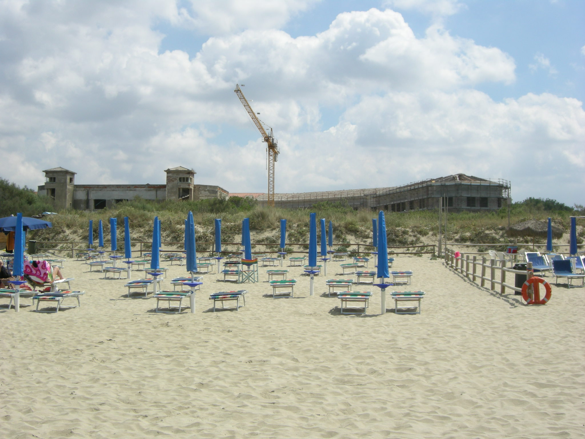 Colonia vittorio emanuele II.